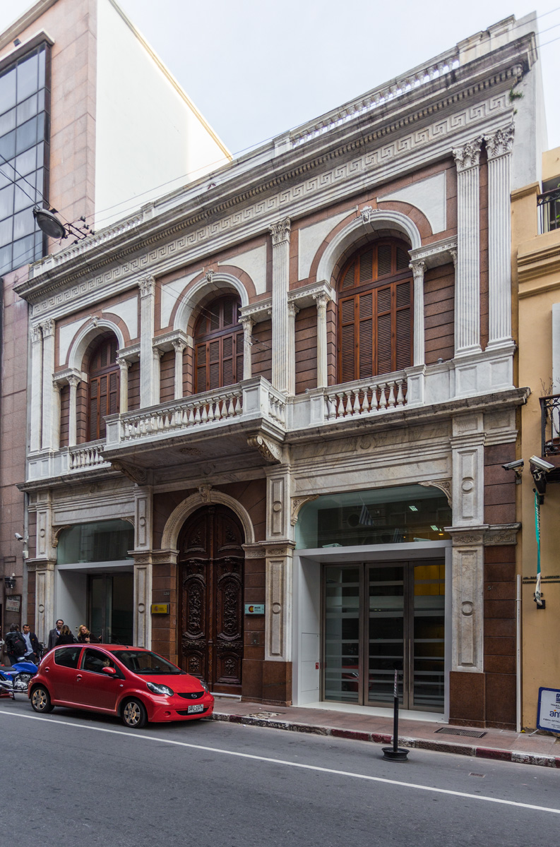 Casa de don Agustín de Castro. Ubicada en el departamento de Montevideo